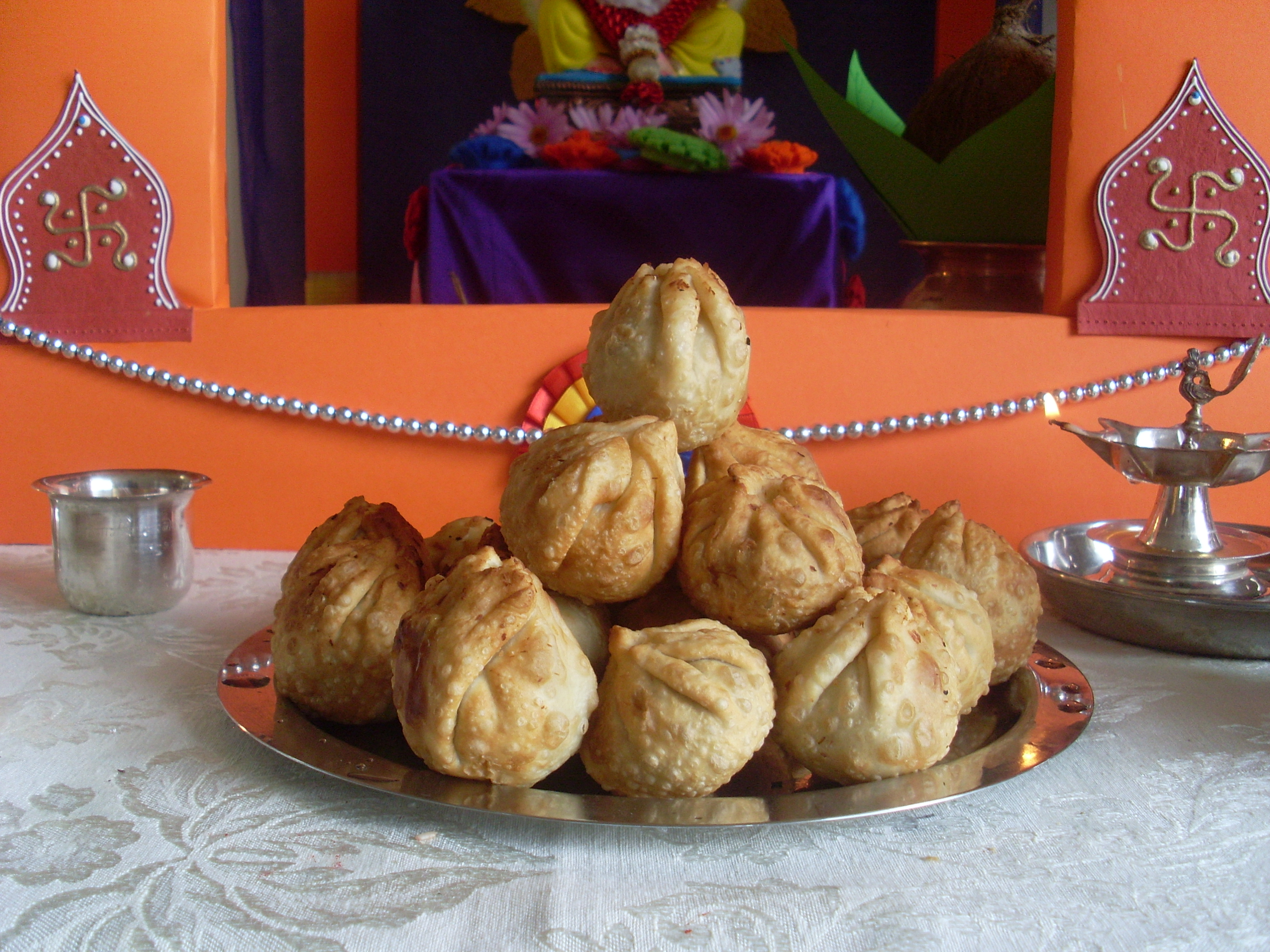 Modak a sweet food specially offered to Ganesha.